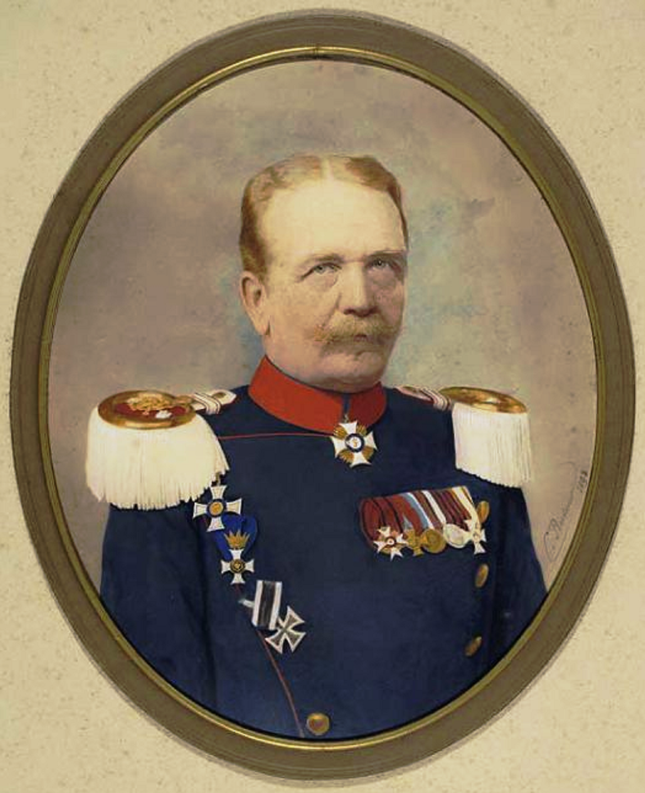 Theodor Carl Gottlieb von Sprösser (1836—1907), Oberst und Kommandeur des Infanterie-Regiments „König Wilhelm I.“ (6. Württembergisches) Nr. 124.von 1884-1886, zuletzt Generalmajor, Brustbild